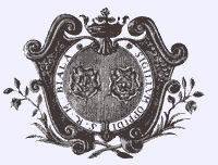 Herb Białej (dzielnica Bielska-Białej) z dokumentu lokacyjnego z 1723 r.